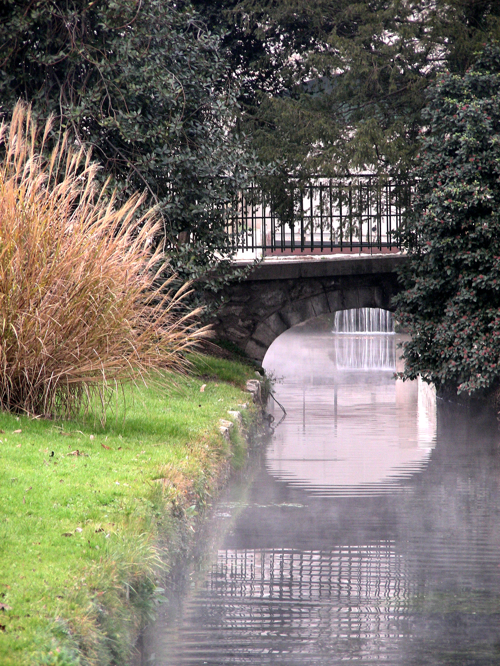 Cute Little Bridge-Parc Jouvet, Valence, Drôme